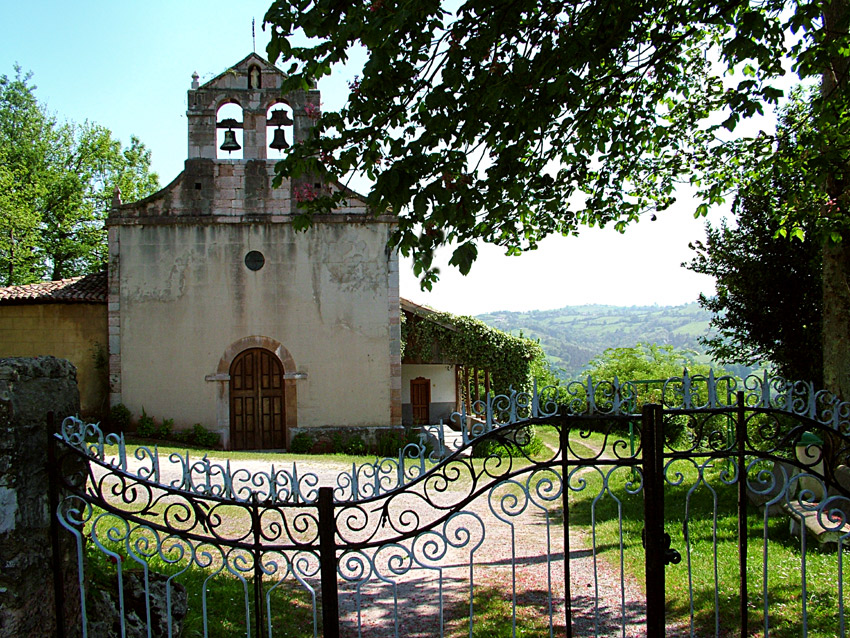 Ref.0100, iglesia de Tellego